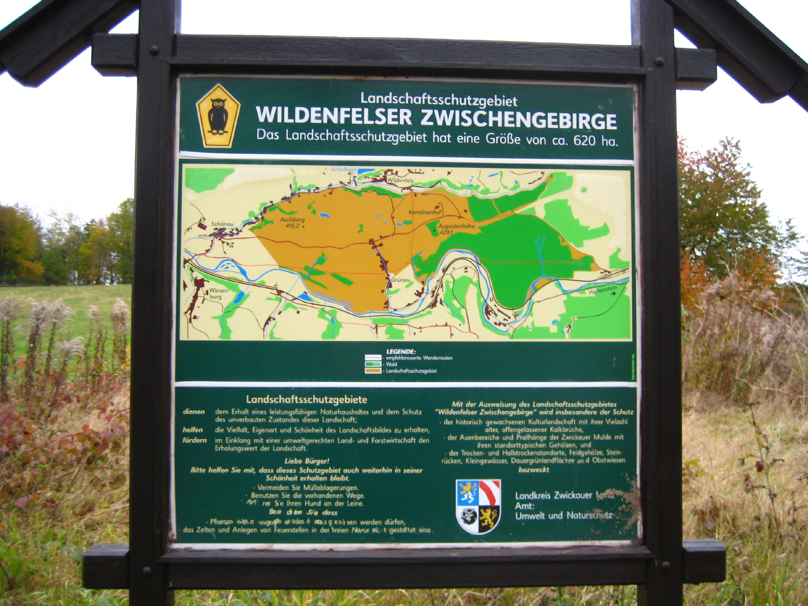 Überblickstafel des Landschaftsschutzgebietes Wildenfelser Zwischengebirge